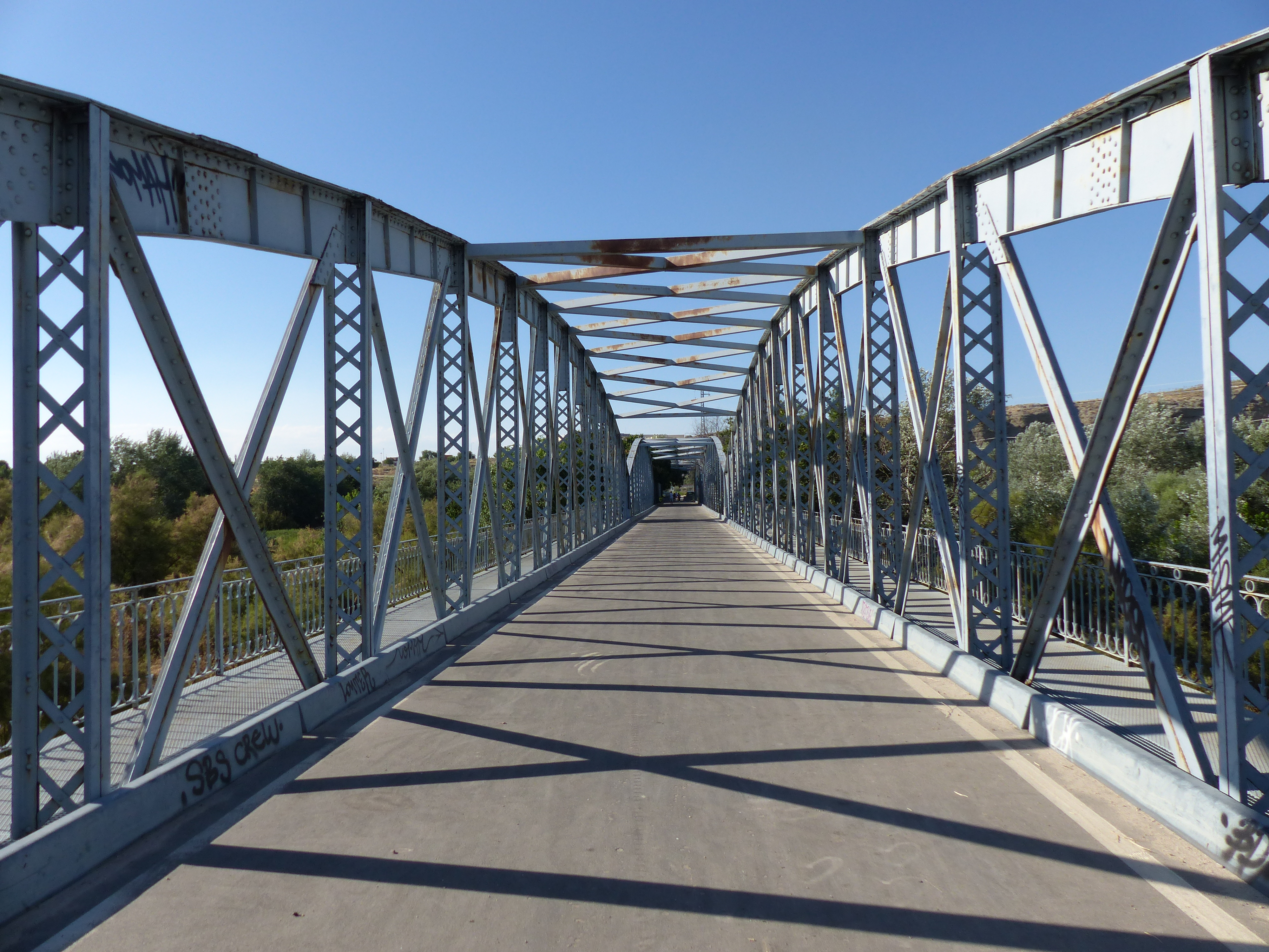 Puente de Arganda del Rey